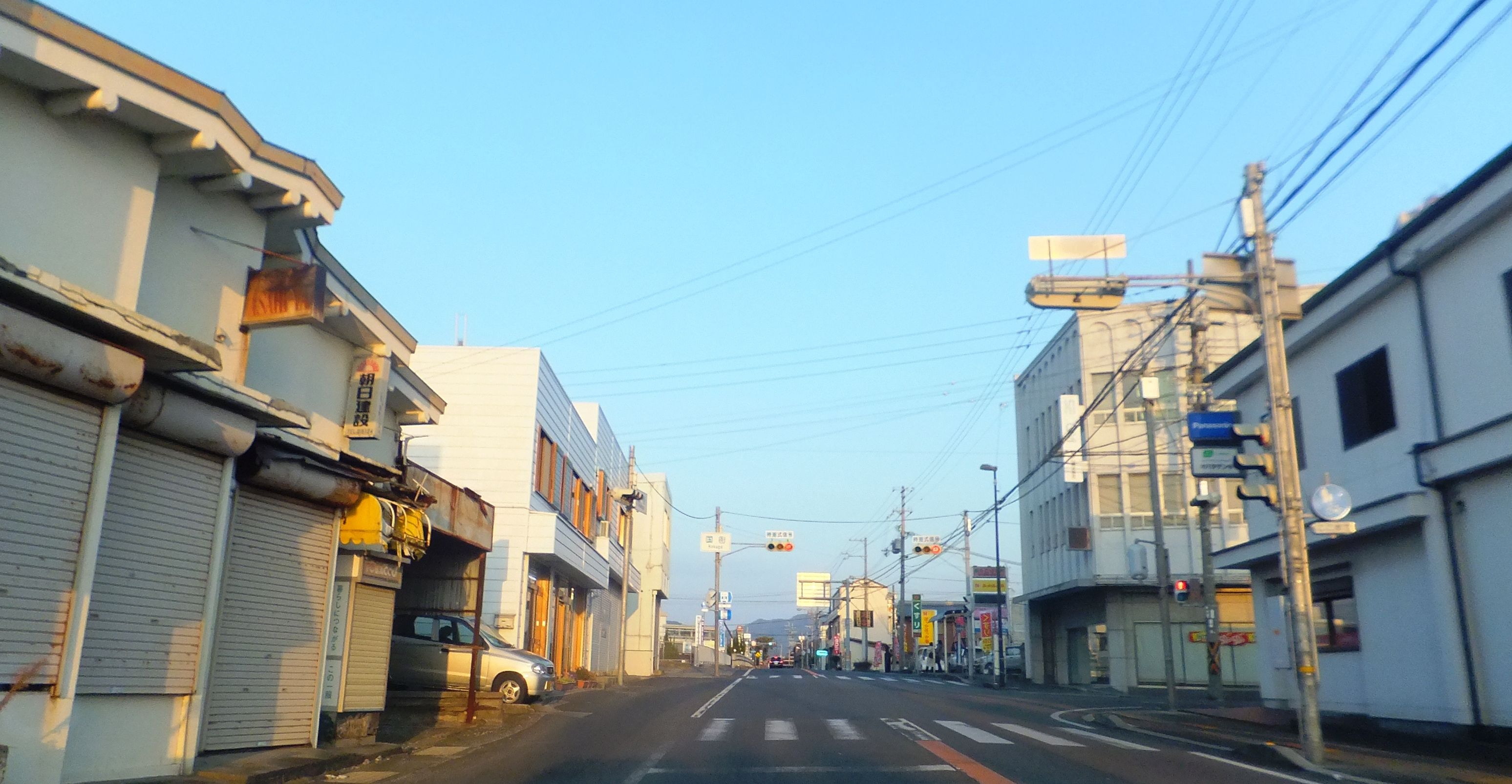 兵庫県南あわじ市神代国衙